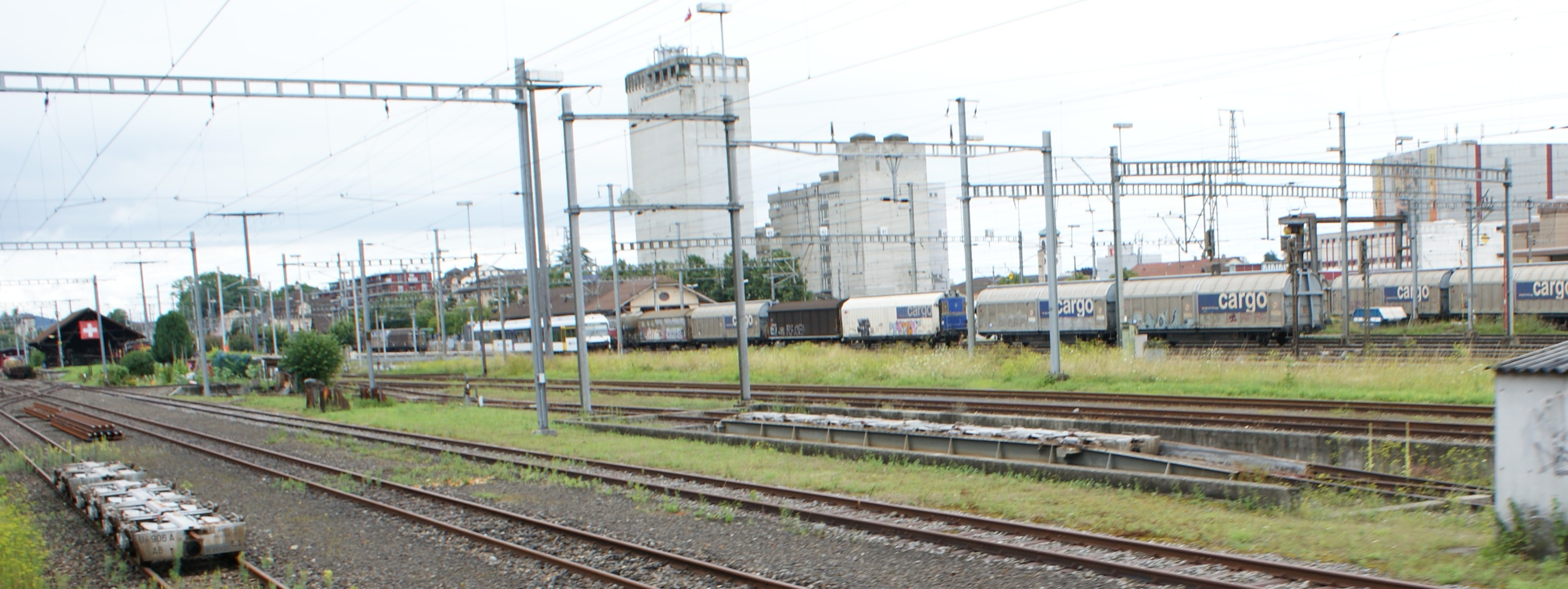 Die Rollbockanlage der Appenzeller Bahnen in Gossau am Tage vor deren offizieller Stilllegung. In der Rollbockgrube und auf einem Abstellgleis befinden sich die übriggebliebenen Rollböcke, vorne links der Ua 906A